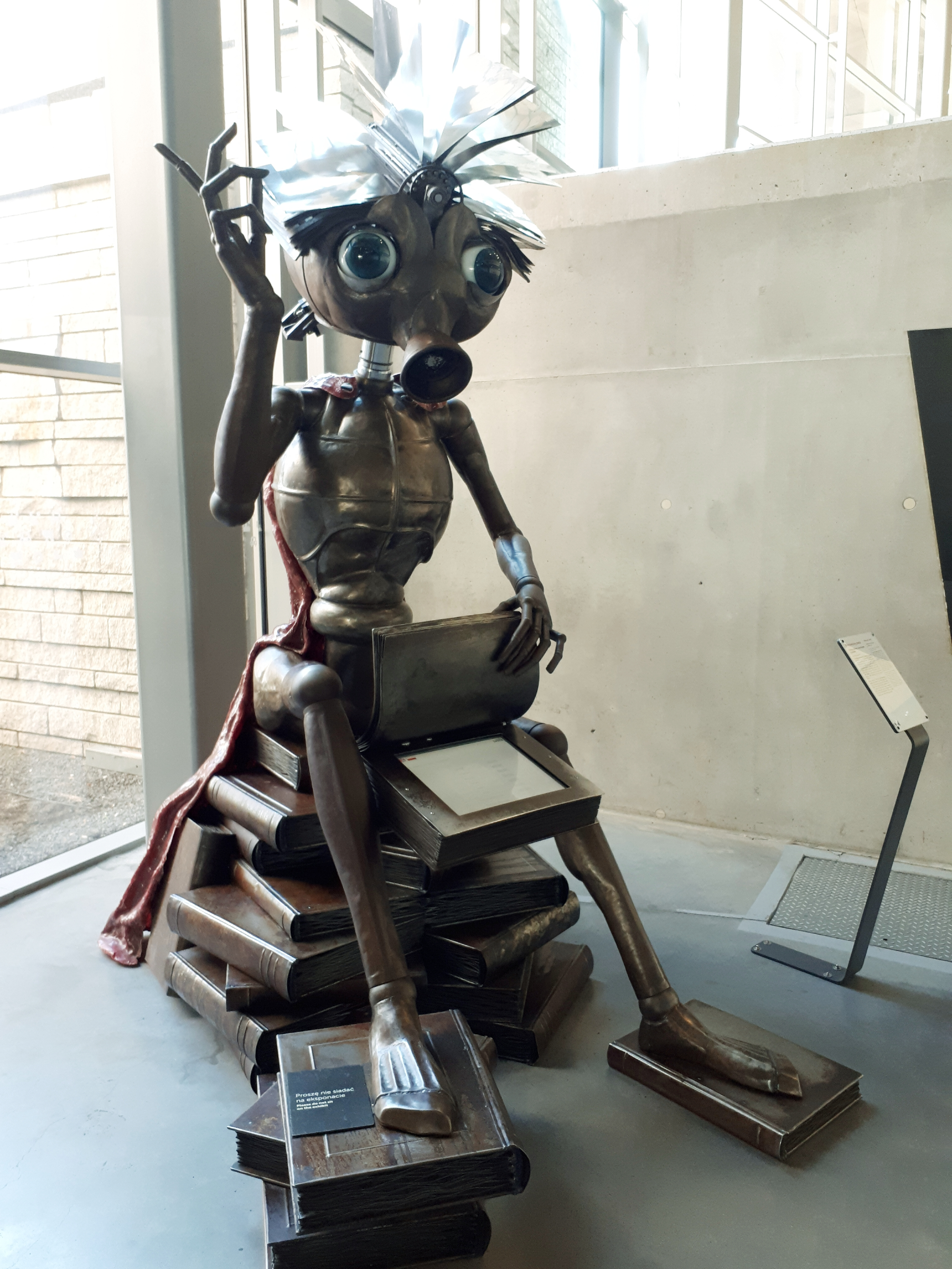 Robot wzorowany na postaci Elektrybałta wymyślonej przez Stanisława Lema. Elektrybałt może na podstawie podanych przez zwiedzającego trzech słów ułożyć m.in. limeryk, epitafium czy sonet. Stoi w Centrum Nauki Kopernik w Warszawie